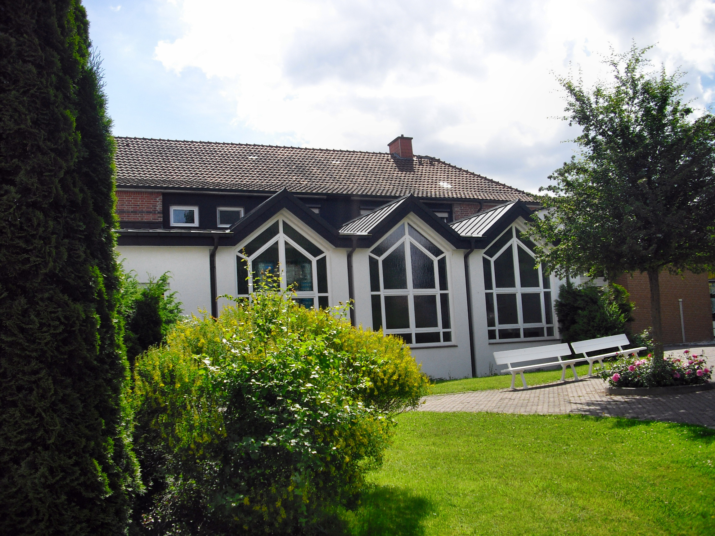 Friedenskirche, Gotteshaus der [Baptisten